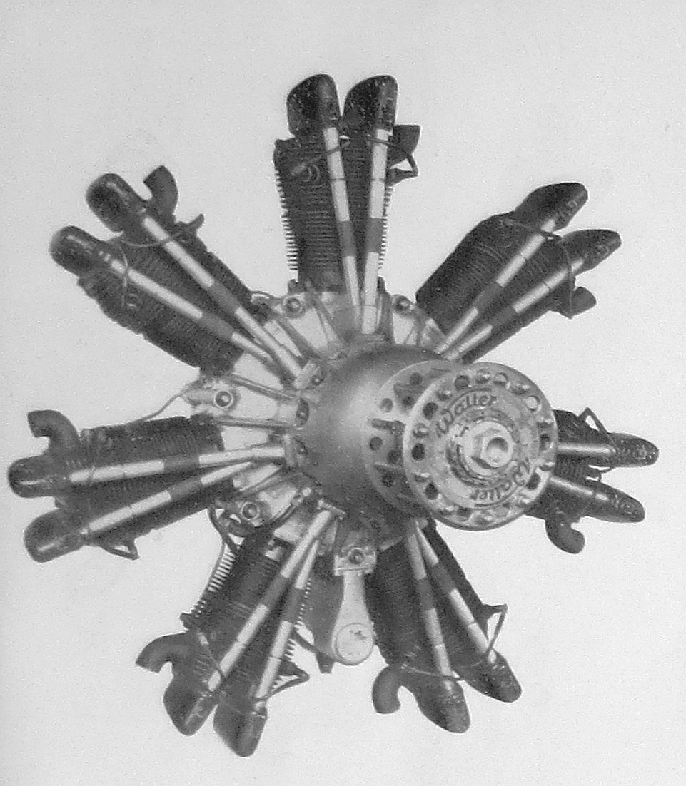 letecký motor Walter Castor III-R (1934)